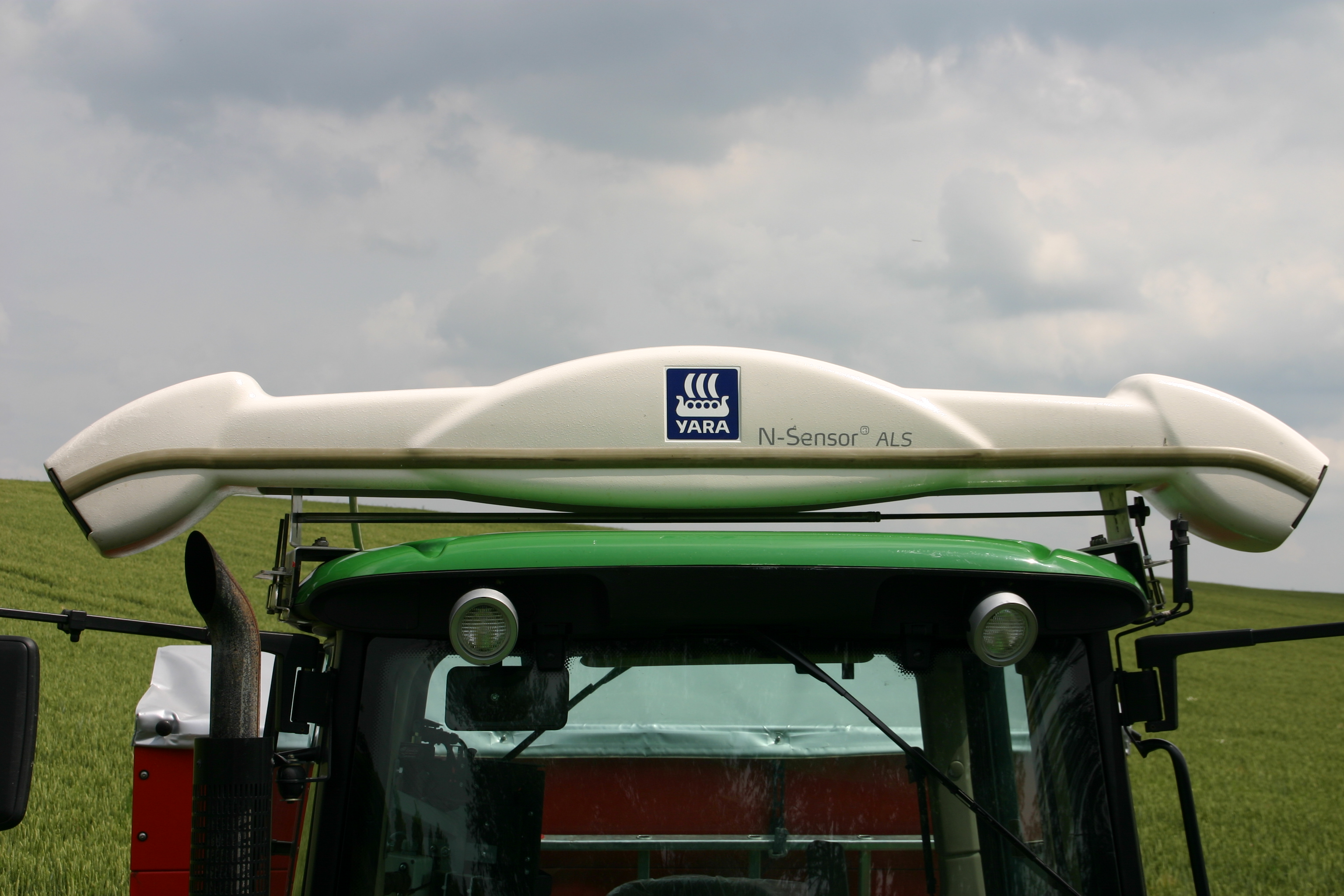 Der YARA N-Sensor, hier auf dem Kabinendach eines Traktors montiert, ist ein Precision-Farming-Werkzeug für die bedarfsgerechte Stickstoffdüngung. Sein Einsatz steigert Ertrag und Qualität des Erntegutes und ist ein wesentlicher Beitrag der Landtechnik zu Umweltschutz und Ressourcenschonung.